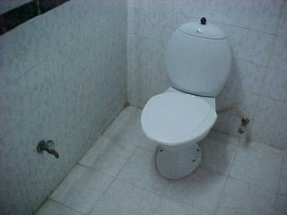 インドのトイレ 撮影データ 撮影地: マドラス（インド） 撮影年月日: 2002年2月下旬 撮影者: Koba-chan ライセンス: GFDL インド大陸南東部沿岸の都市、マドラス市街の旧式ホテル客室の洗面所・シャワー室に併設の水洗トイレ。写真左側に写っている壁付きの蛇口は用便後に尻を洗うために用いる手桶に給水するためのもの。このホテルではトイレットペーパーを固定するペーパー・ホルダーはない。新しい建物では手桶と共に蛇口から便器まで届く長さの金属性の蛇腹のホースが接続しておりペーパーホルダーが併設する。同じ様式のトイレはマレーシアの首都クアラルンプールに位置するハブ空港のクアラルンプール空港内に存在する。